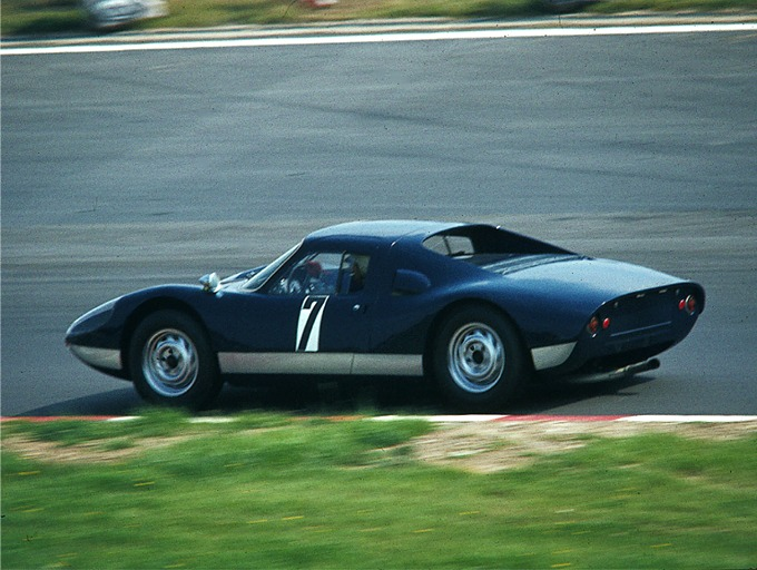 Porsche 904 auf dem Nürburgring beim Oldtimer-Grand Prix 1981